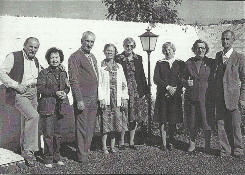 Alcides Longhi com sua esposa e familiares